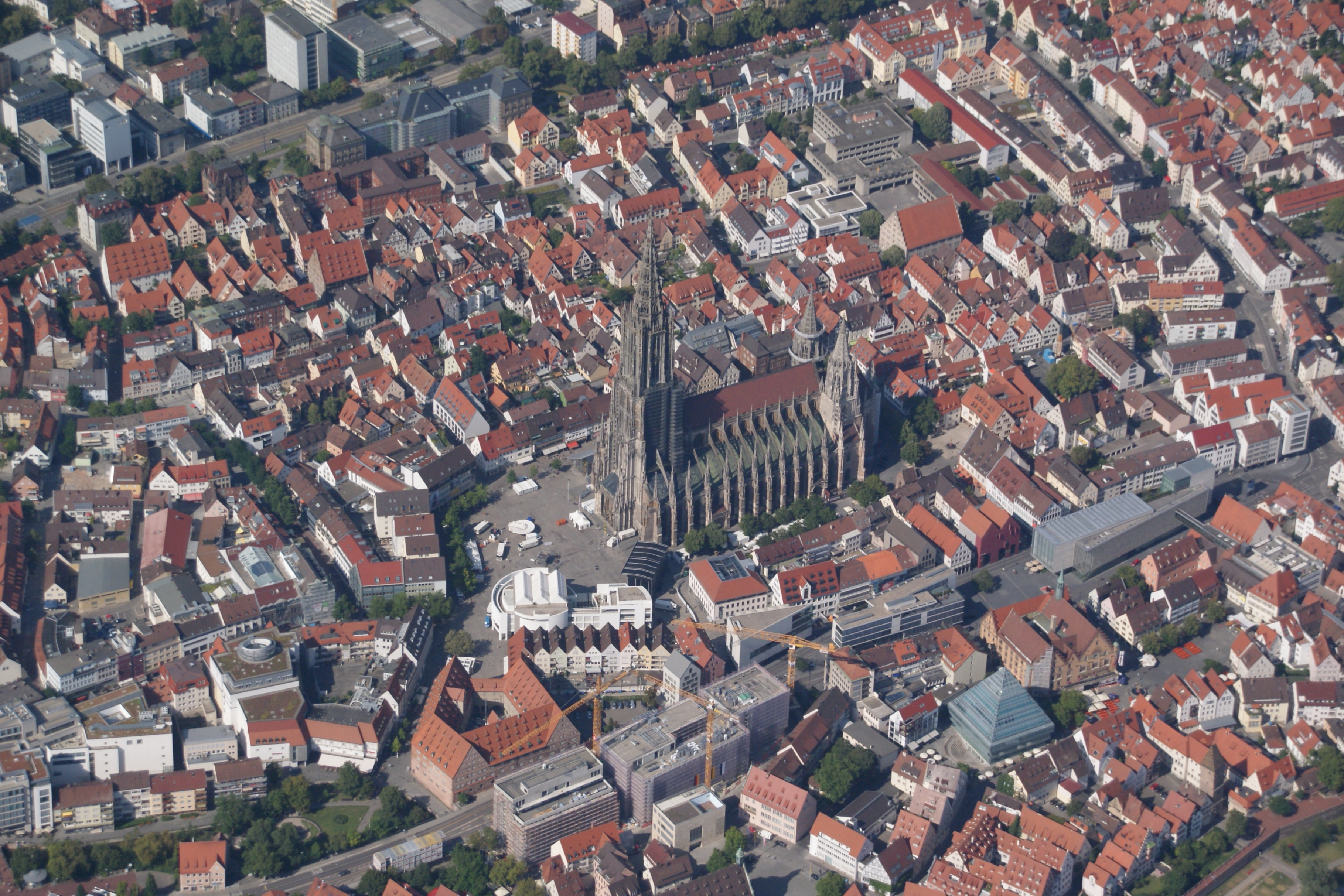 Ulm, Stadtmitte mit dem Münster